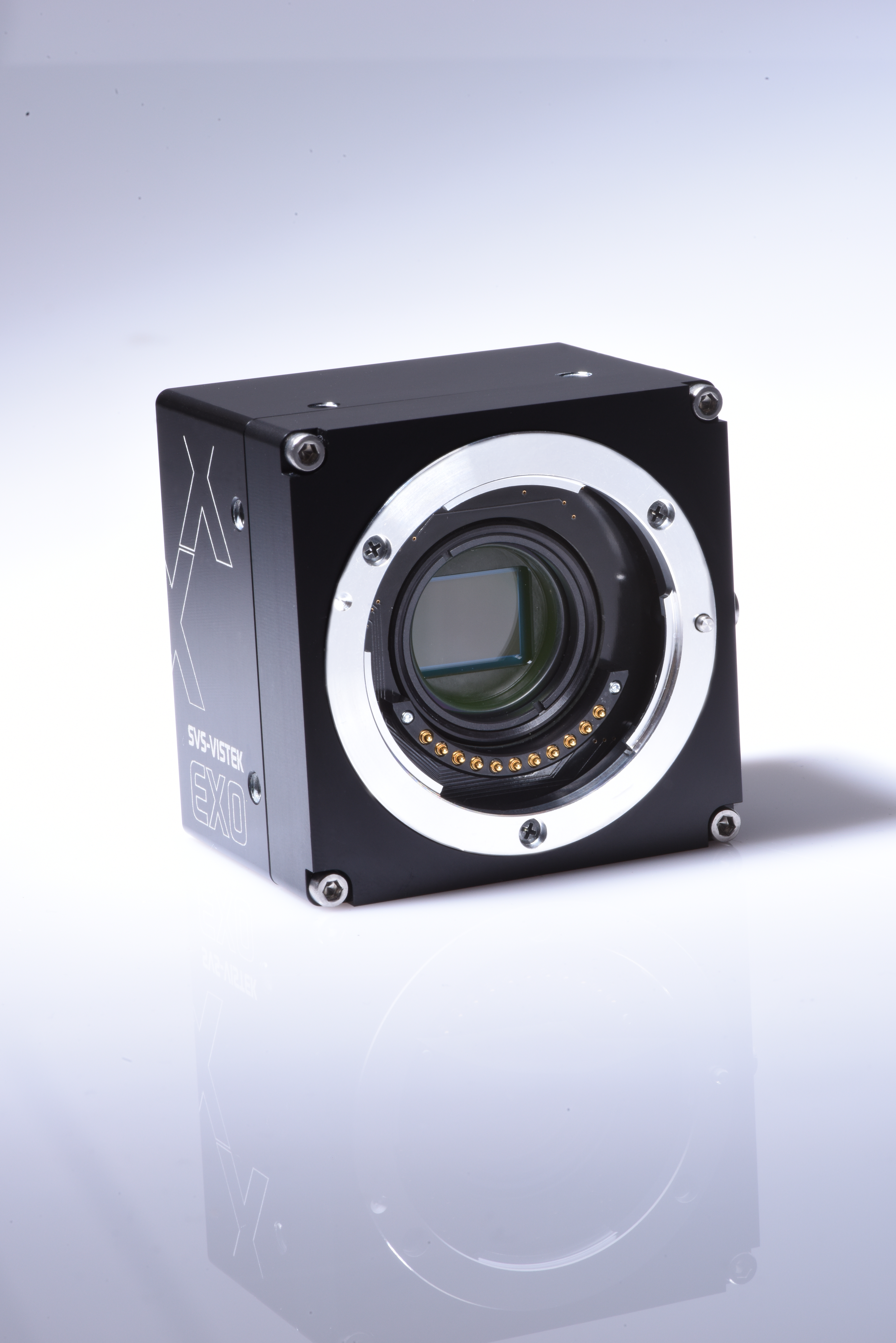 Die EXO Tracer von SVS-Vistek ist eine klassische Industriekamera mit MFT Mount. Bis zu 20 MP und eine Framerate von 5 Bildern in der Sekunde zeichnen sie aus.